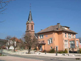 Village de Saint-Germain-le-Châtelet (Territoire de Belfort) Photo prise par LP90 en mai 2004 copyright : licence GFDL LP90 mai 2004